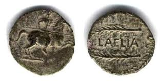 Moneda encontrada een el termino municipal de Albaida